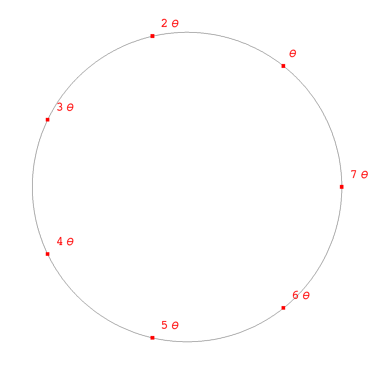 Умношци рационалног броја θ = 1/7 модуло 1. Слику направио Dzordzm у програмском пакету Mathematica.